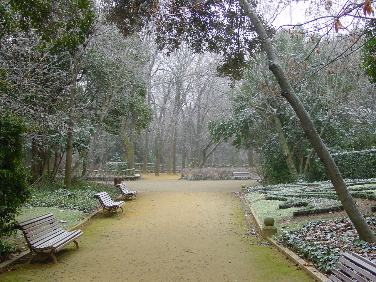 Campo Grande de Valladolid (España), invierno de 2006.